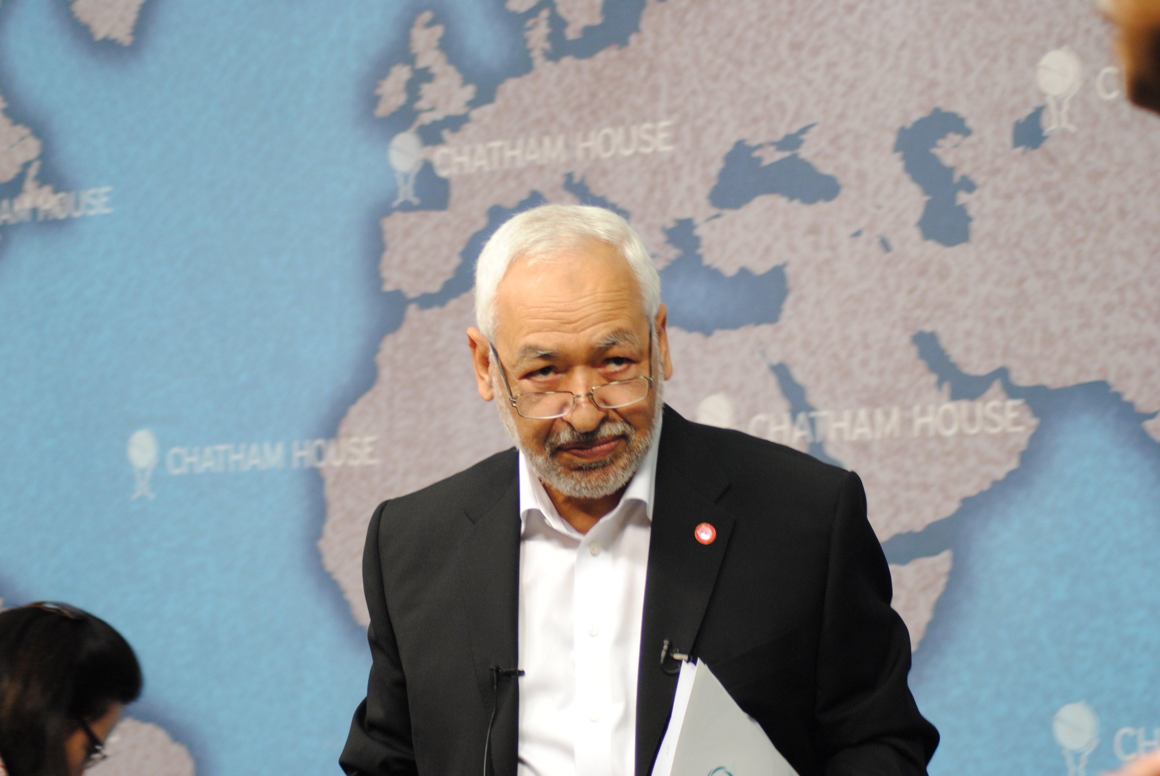 Sheikh Rached Ghannouchi